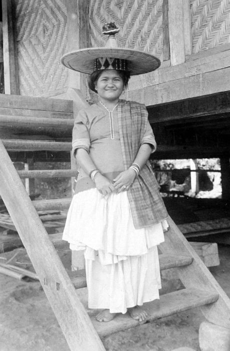 Repronegatief. Portret van een vrouw uit Koelawie in traditionele kleding